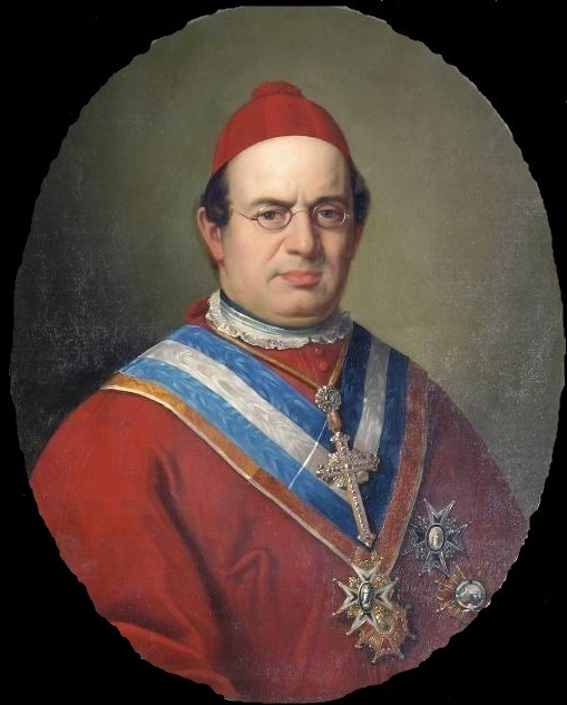 Retrato del cardenal Fernando de la Puente y Primo de Rivera (1808-1867), que fue arzobispo de Burgos y obispo de Salamanca. El prelado aparece revestido con el traje cardenalicio y luciendo varias condecoraciones.